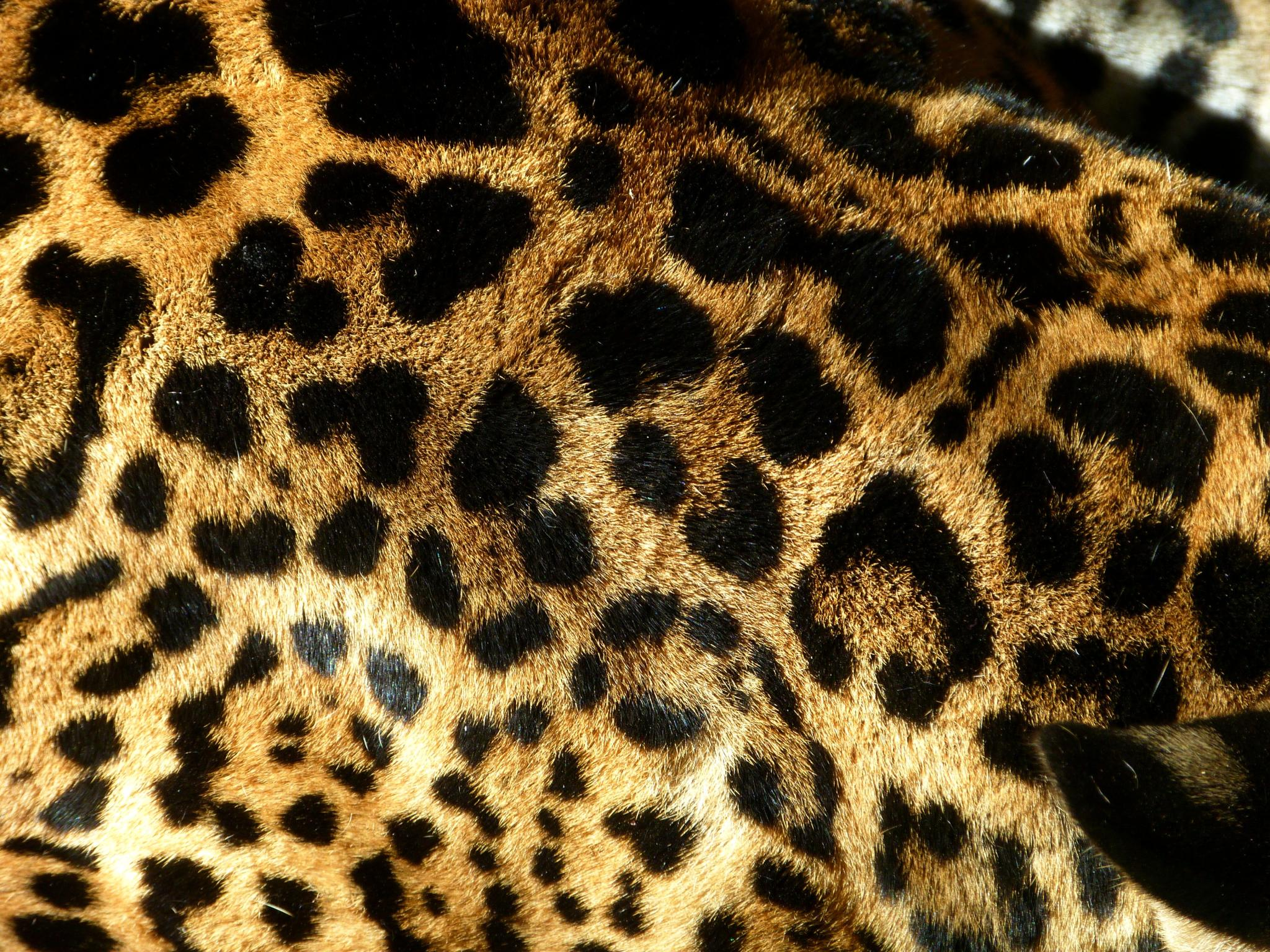 jaguars